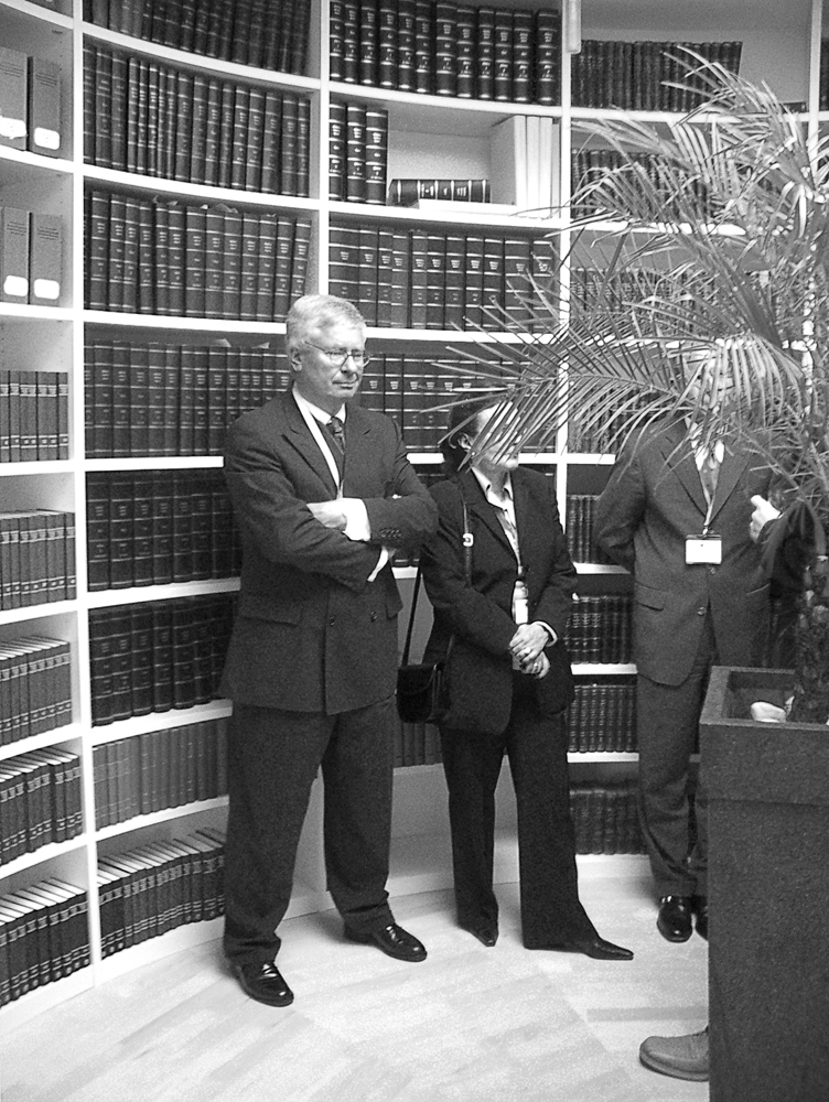 Critical Aesthetics, systemic art research and intervention, study, 1999, Ruediger John